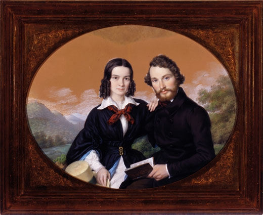 Portrait der deutschen Schriftstellerin Marie Nathusius und ihres Ehemanns Philipp von Nathusius zur Zeit ihrer Verlobung.